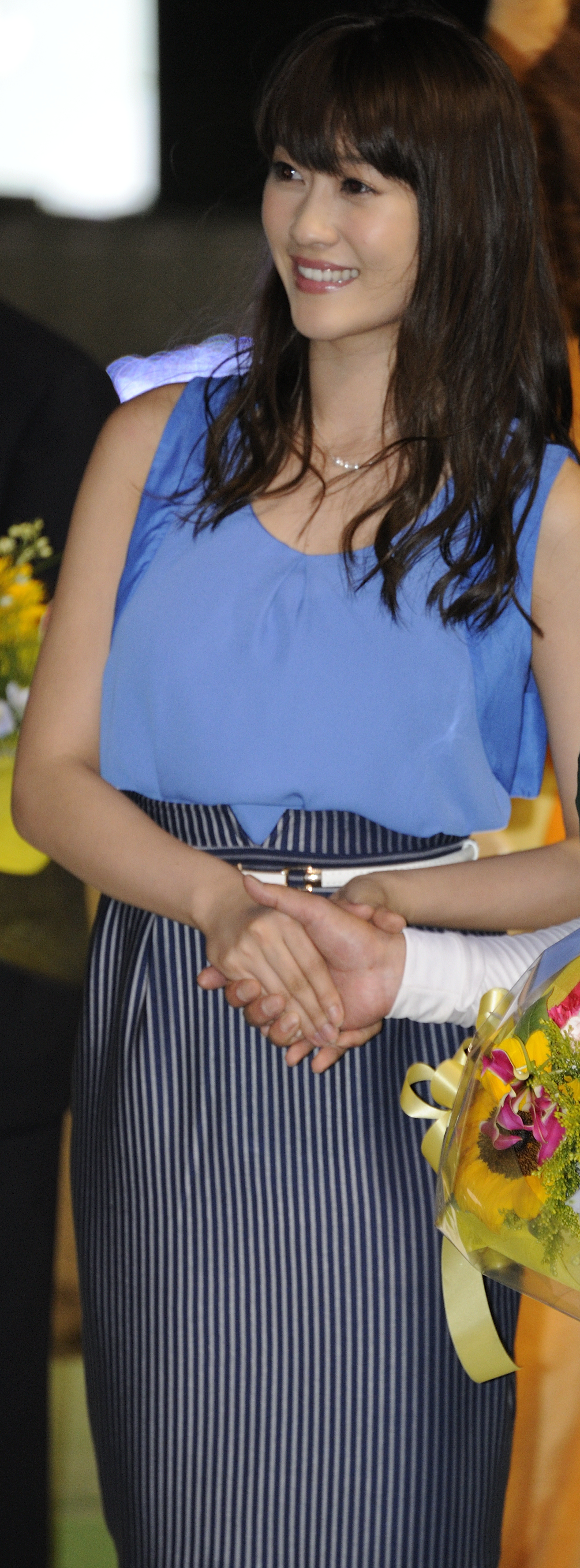 2015年6月3日、東京ダービーを制した今野忠成とプレゼンターを務めた原幹恵